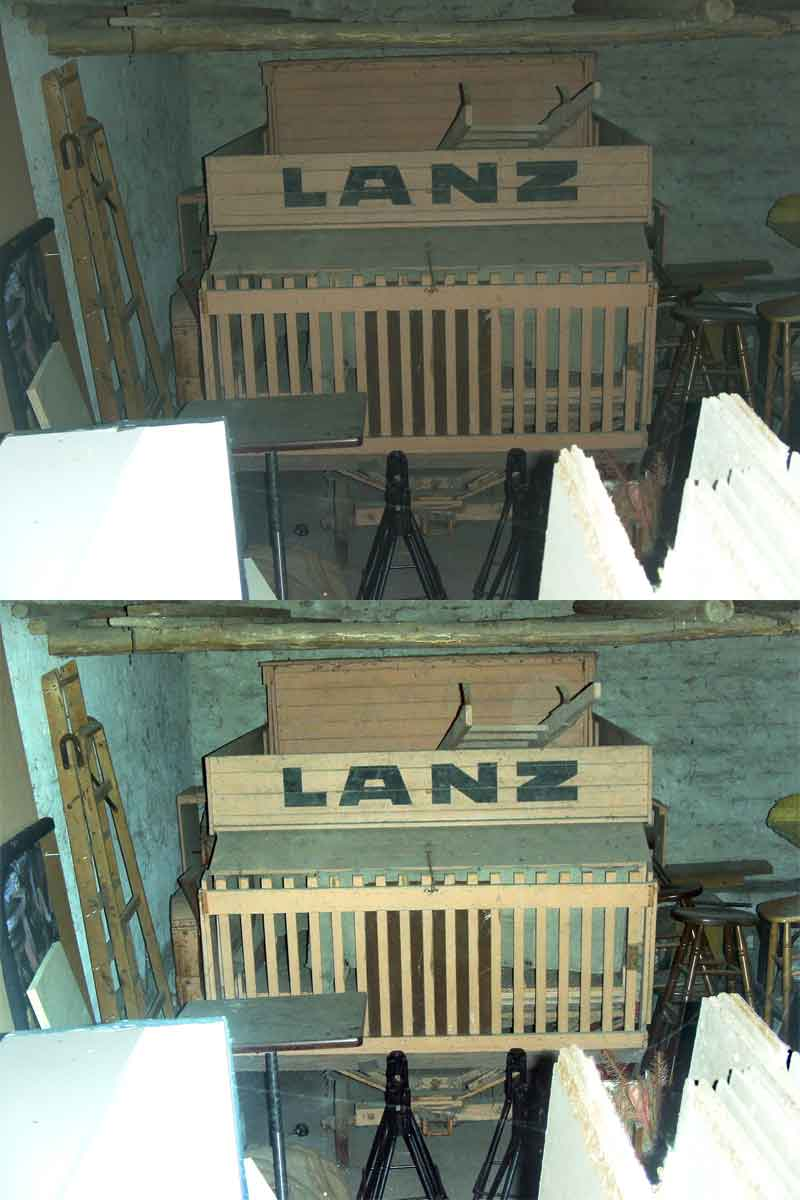 Das obere Bild zeigt eine Blitzlichtaufnahme mit zu schwachem Blitz Das untere Bild zeigt eine Blitzlichtaufnahme mit ausreichendem Blitz Author: Ralf Roletschek (User:Marcela)